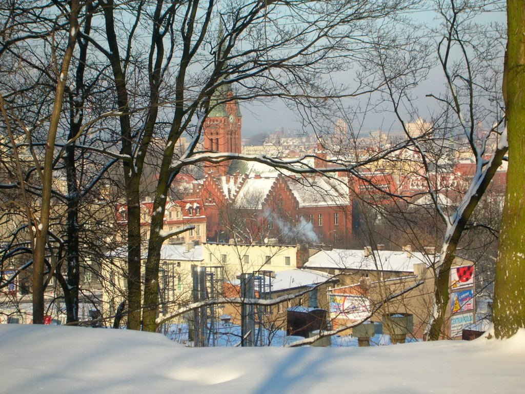 Park Wzgórze Wolności w Bydgoszczy